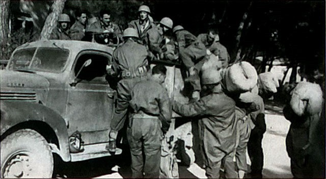 Paracadutisti della Centuria Nembo salgono alle ore 18:00 a Castiglioncello sull'autocarro diretto all'aeroporto di Rosignano per imbarcarsi sugli aerei per l'operazione Herring